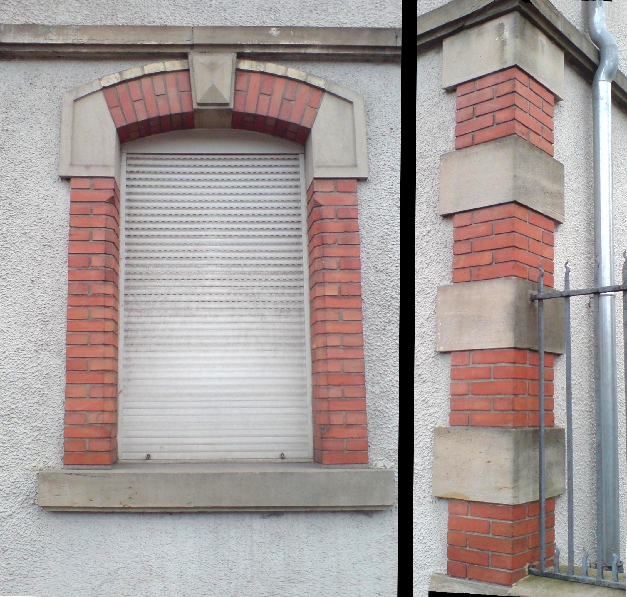 Il s'agit d'une fenêtre et d'une arrête d'une maison à Lure, ville de Haute-Saône. On peut observer l'architecture qui joue sur le grès et la brique rouge